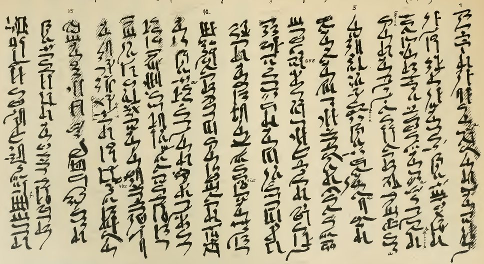 Beginn des Papyrus Berlin 3022, der die Geschichte von Sinuhe enthält, eine altägyptische Erzählung aus dem Mittleren Reich (12. Dynastie, ca. 1800 v.Chr.) als Faksimile von Georg Möller (Hieratische Lesestücke).